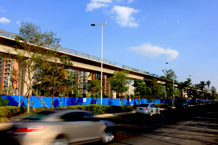 昆明轨道交通首期工程南段的一段高架段